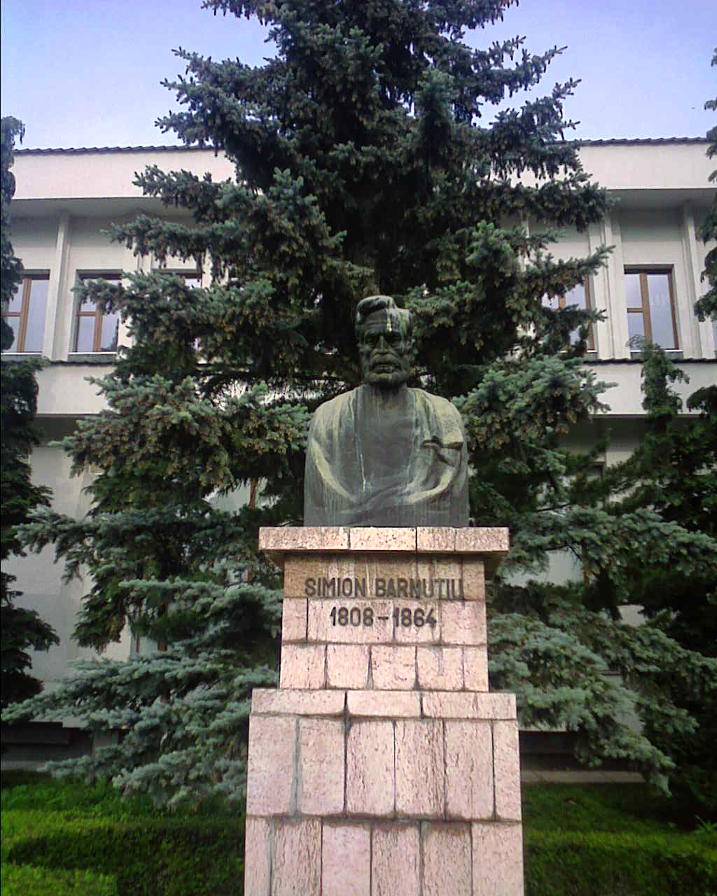 Statuia lui Simion Bărnuţiu din Zalău